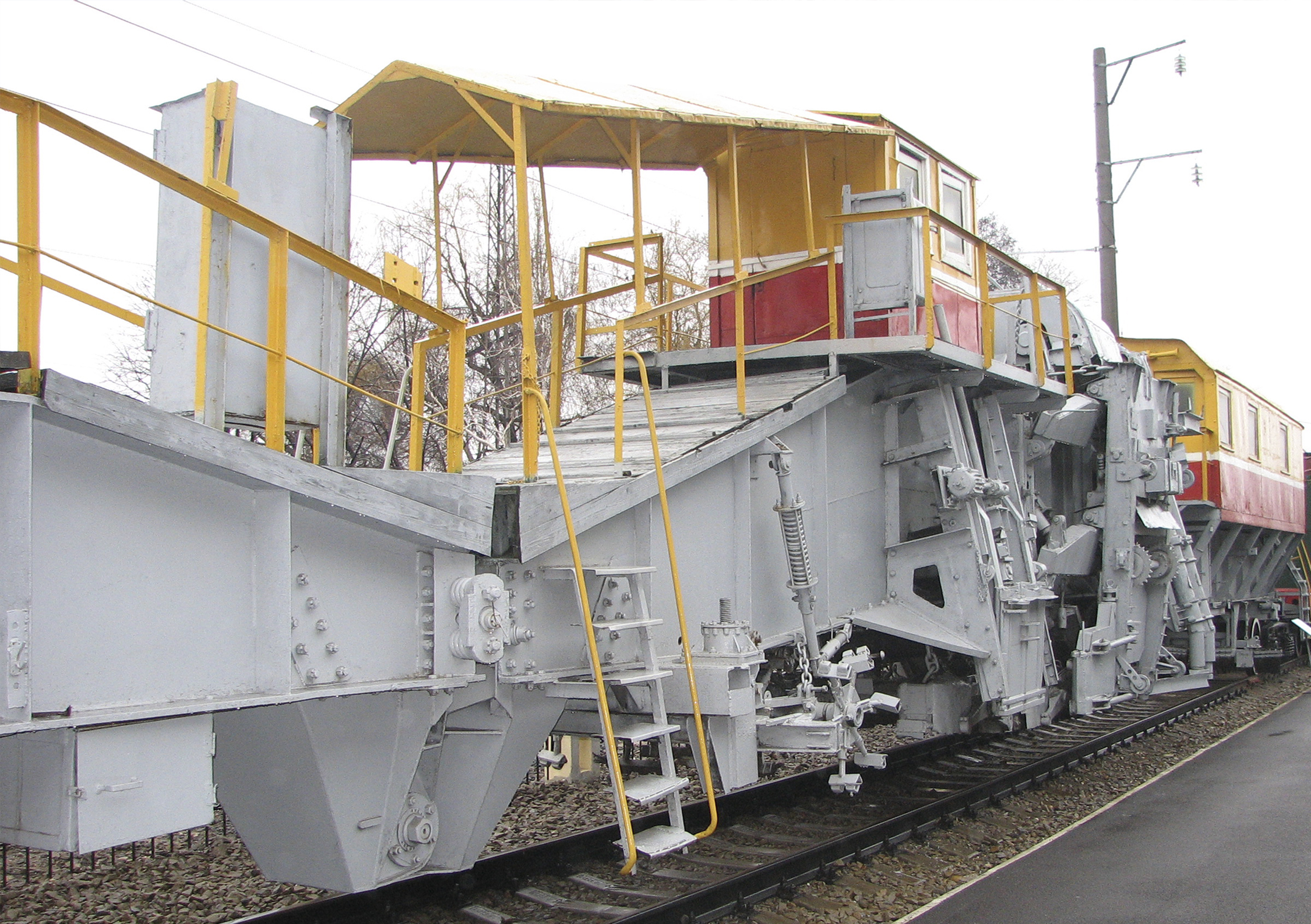 Построена в 1935 году Калужским машиностроительным заводом